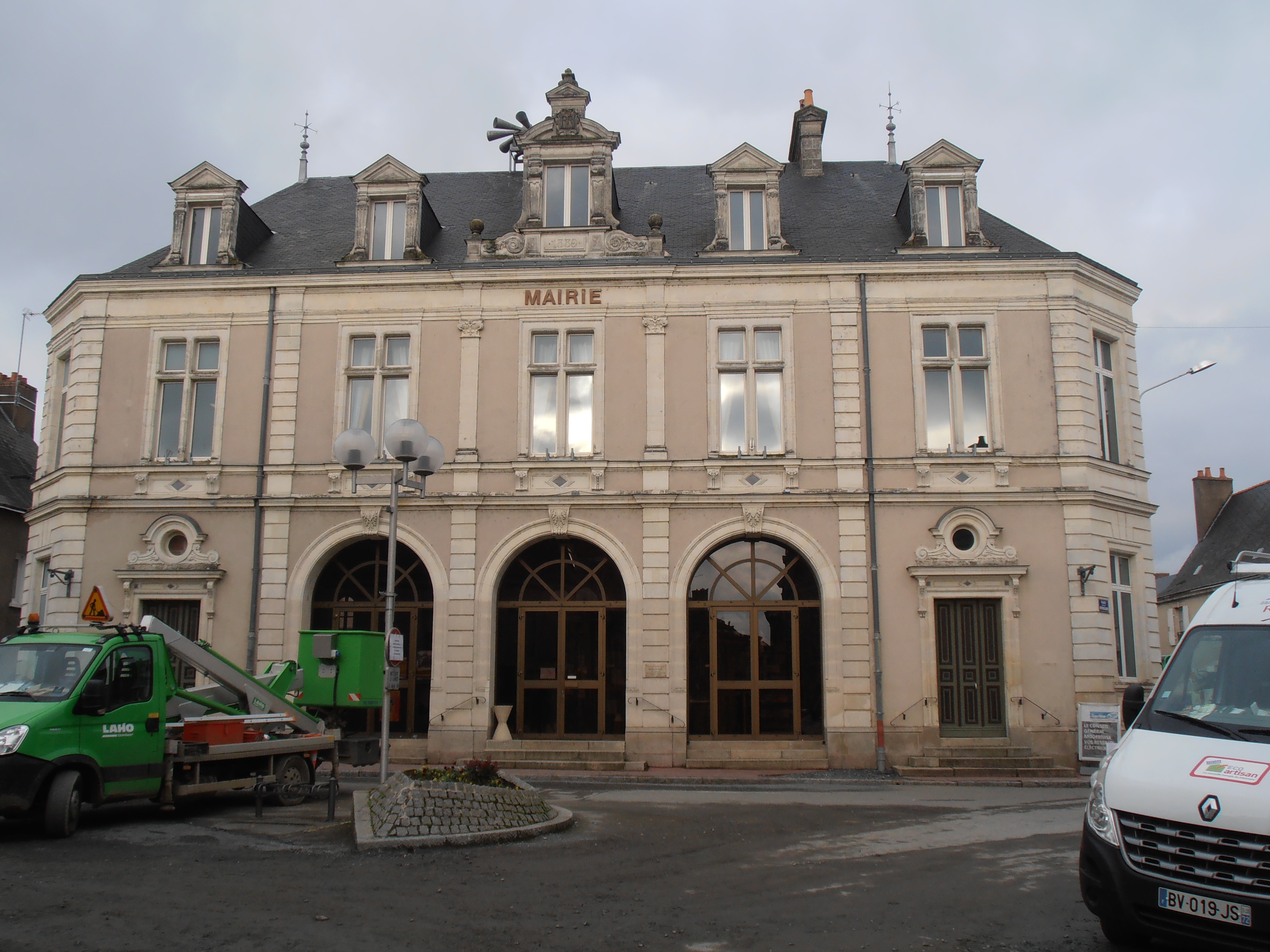 La mairie de Noyen